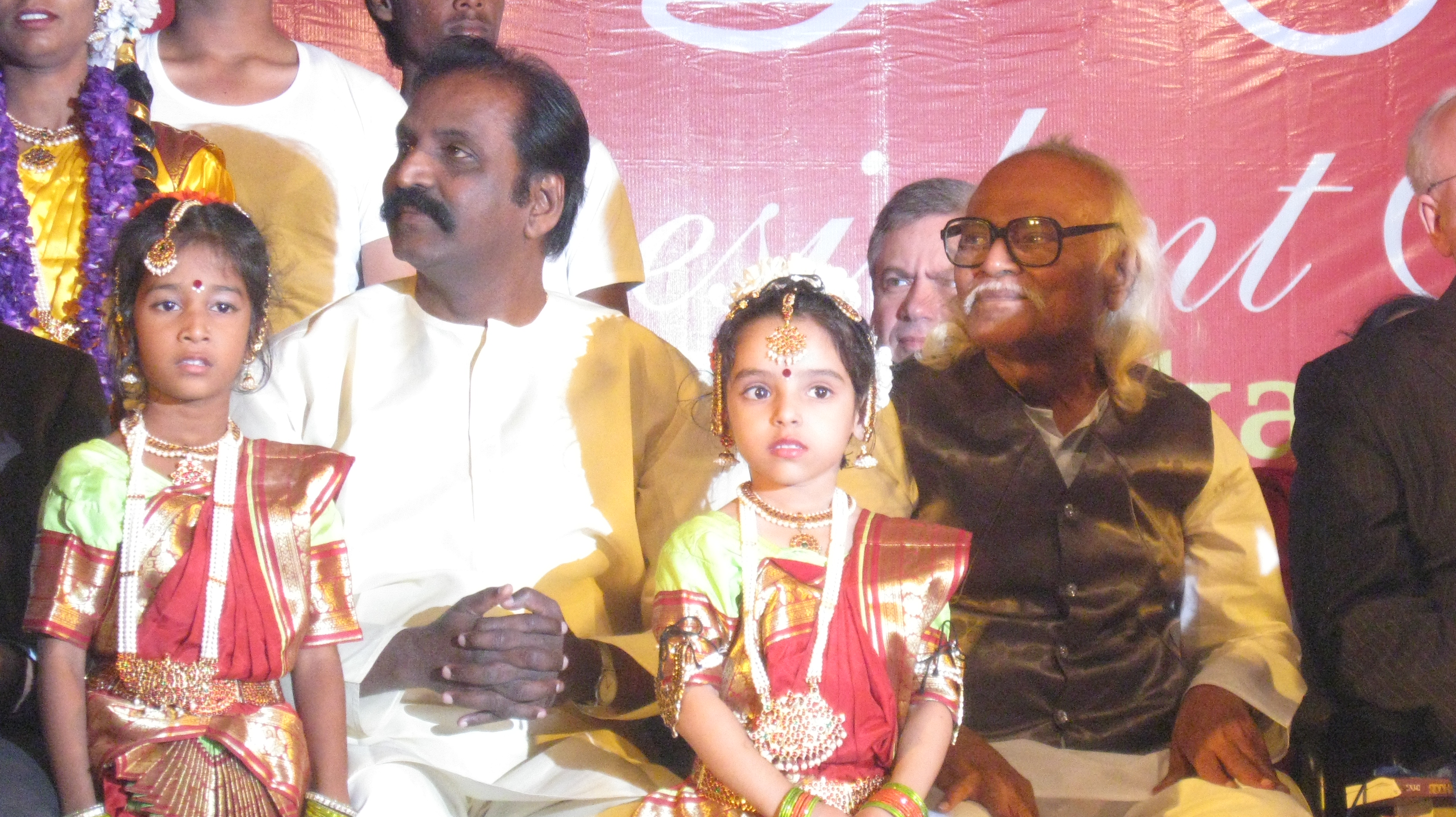 வைரமுத்துவும் ஜெயகாந்தனும்